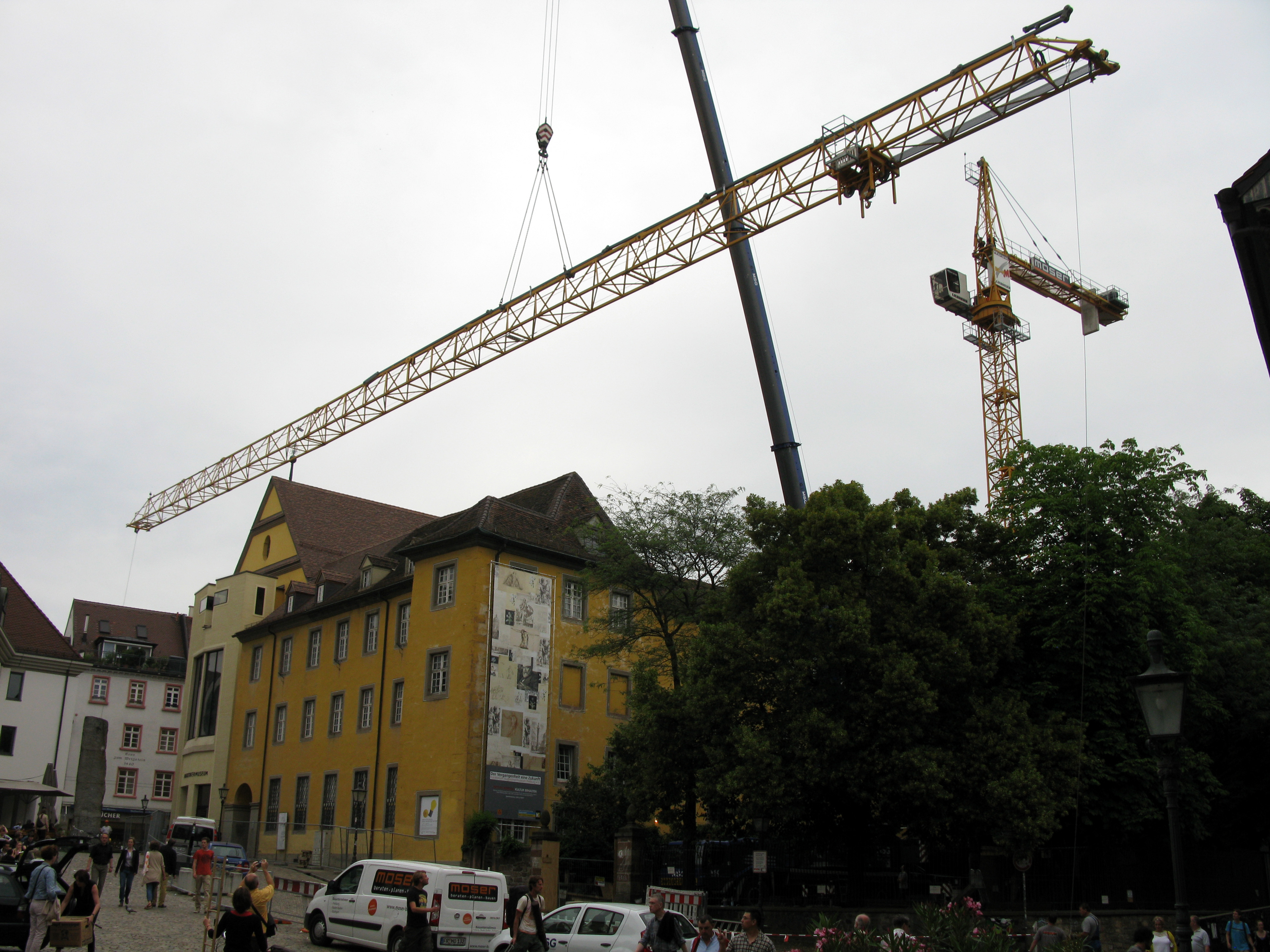 Kranaufbau für den 2. Bauabschnitt des Augustinermuseums in Freiburg